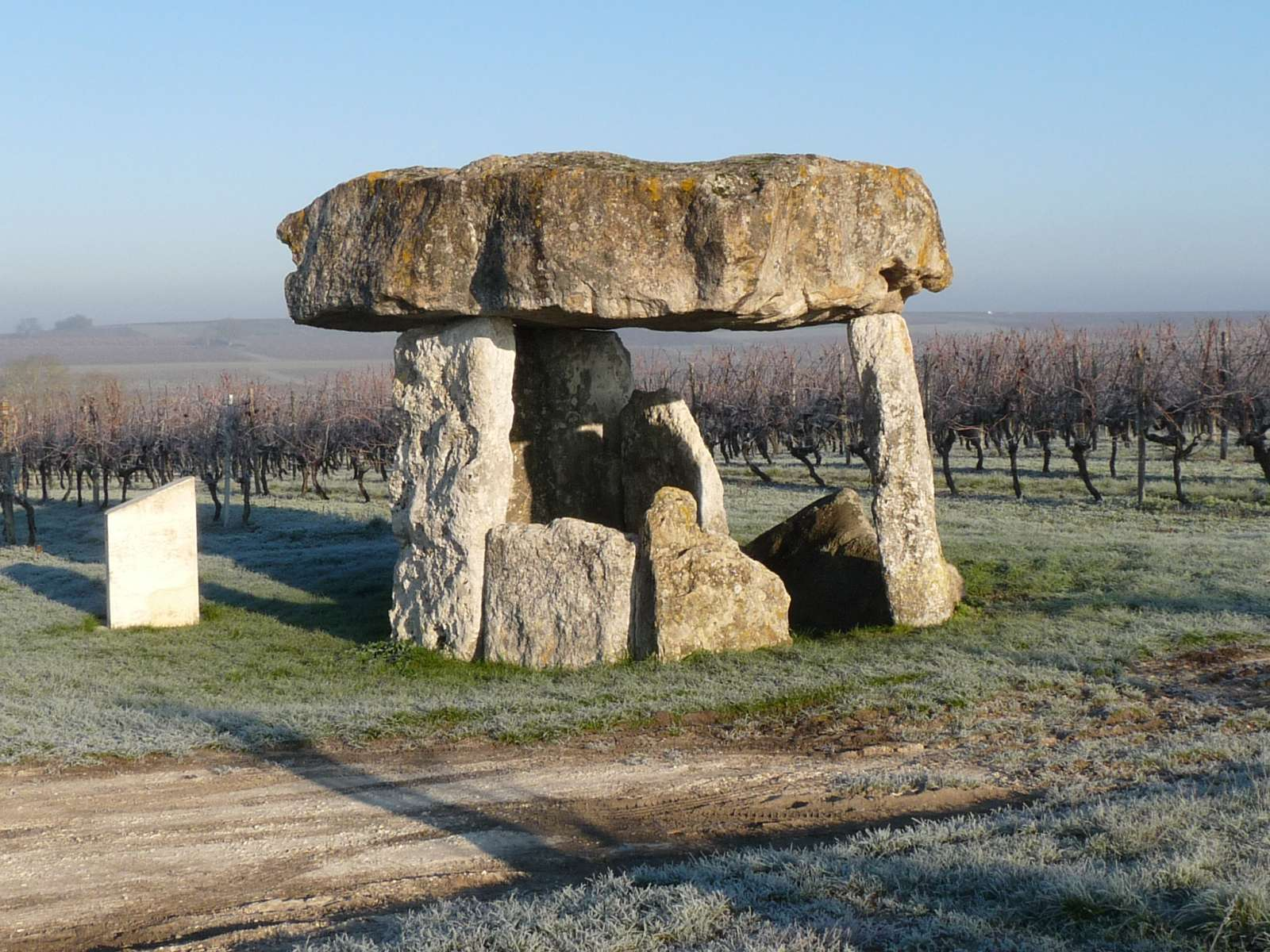 dolmen de St-Fort-sur-le-Né, Charente, France